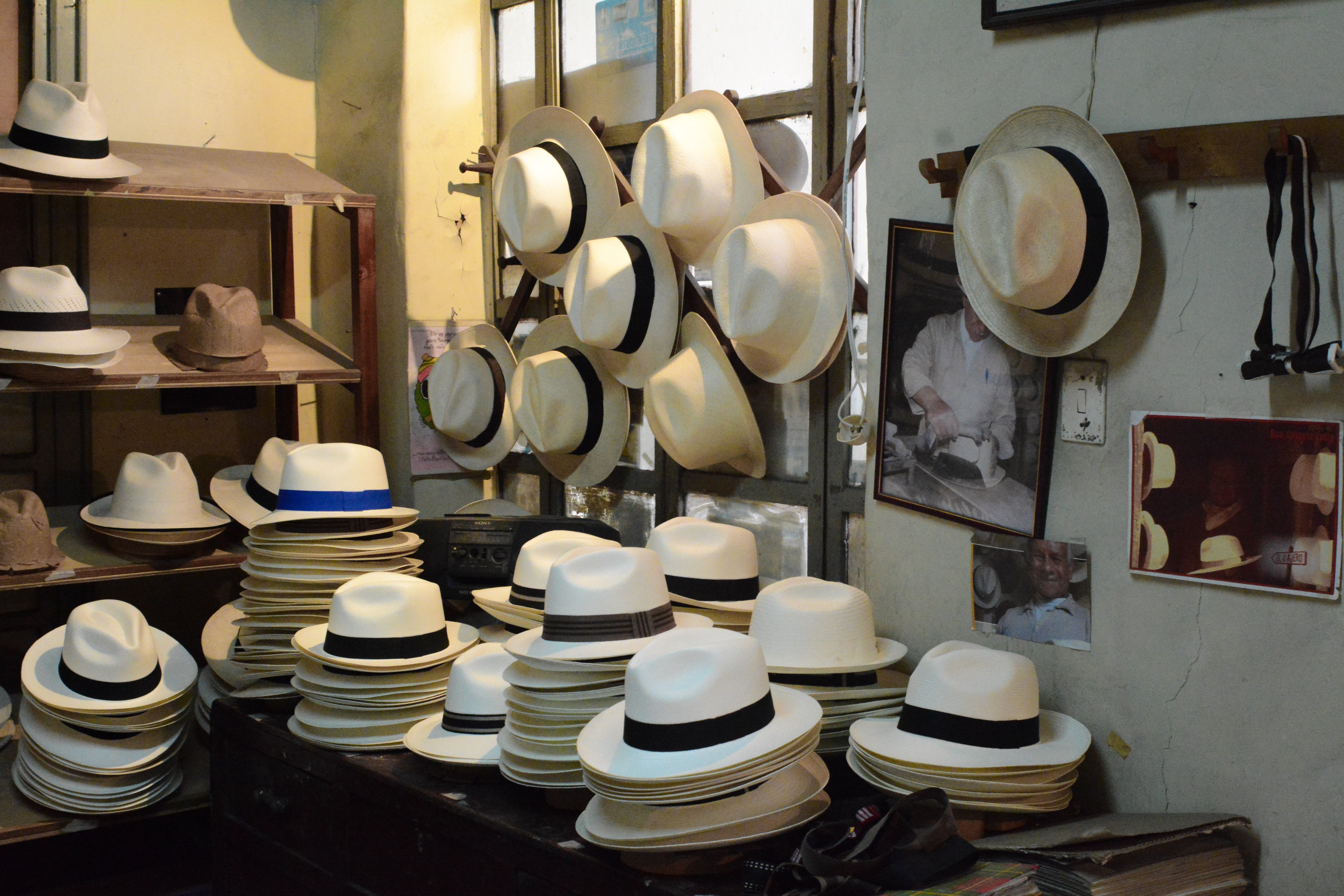 Sigsig, Ecuador